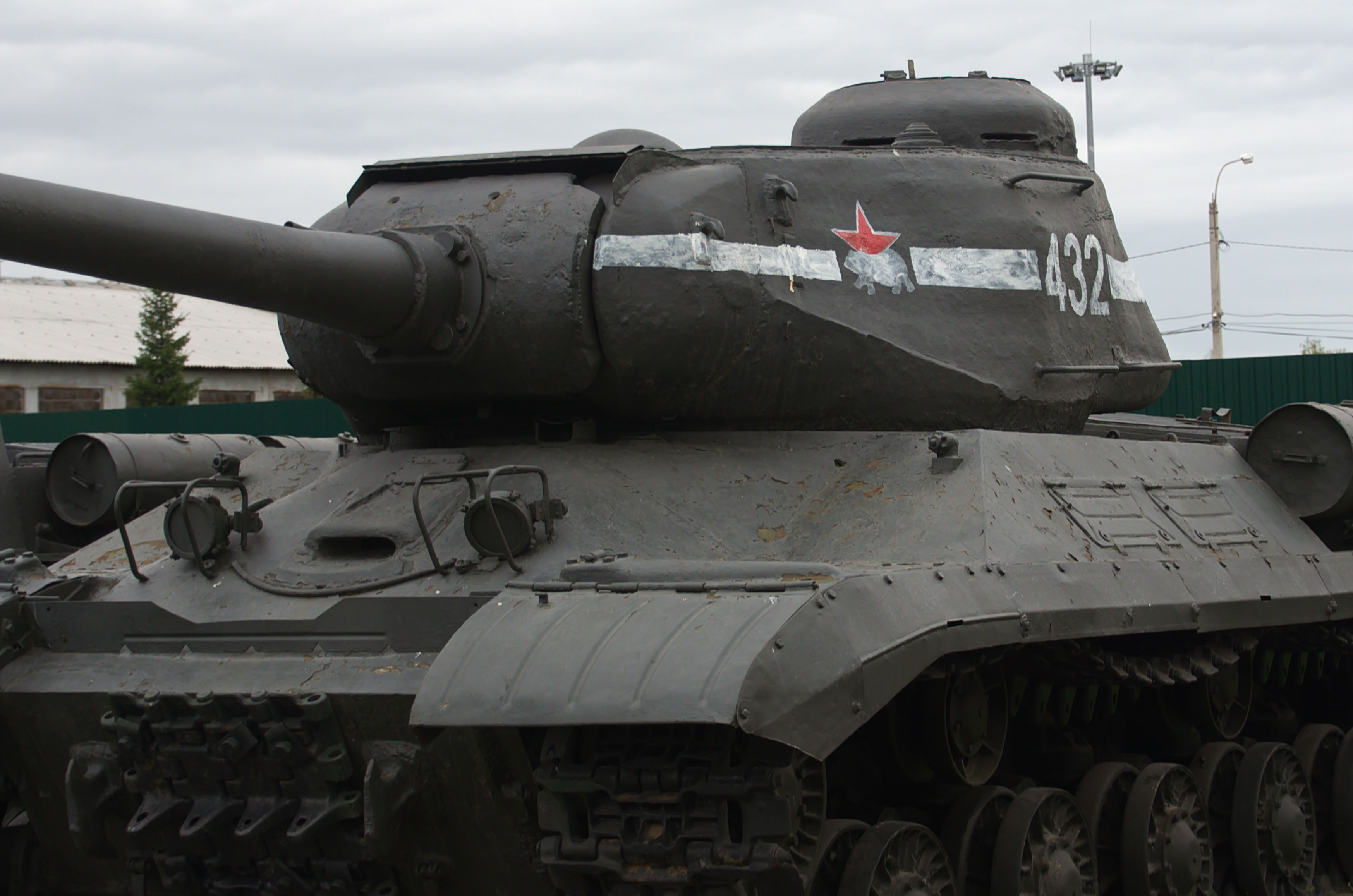 0466 - Moskau 2015 - Panzermuseum Kubinka